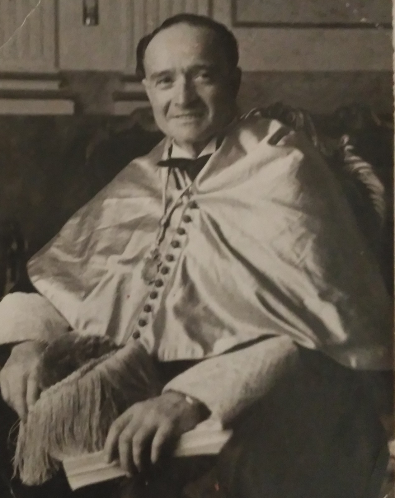 Luis García Sainz en otoño de 1947 cuando realiza el discurso de apertura de curso de la universidad de Valencia en España.